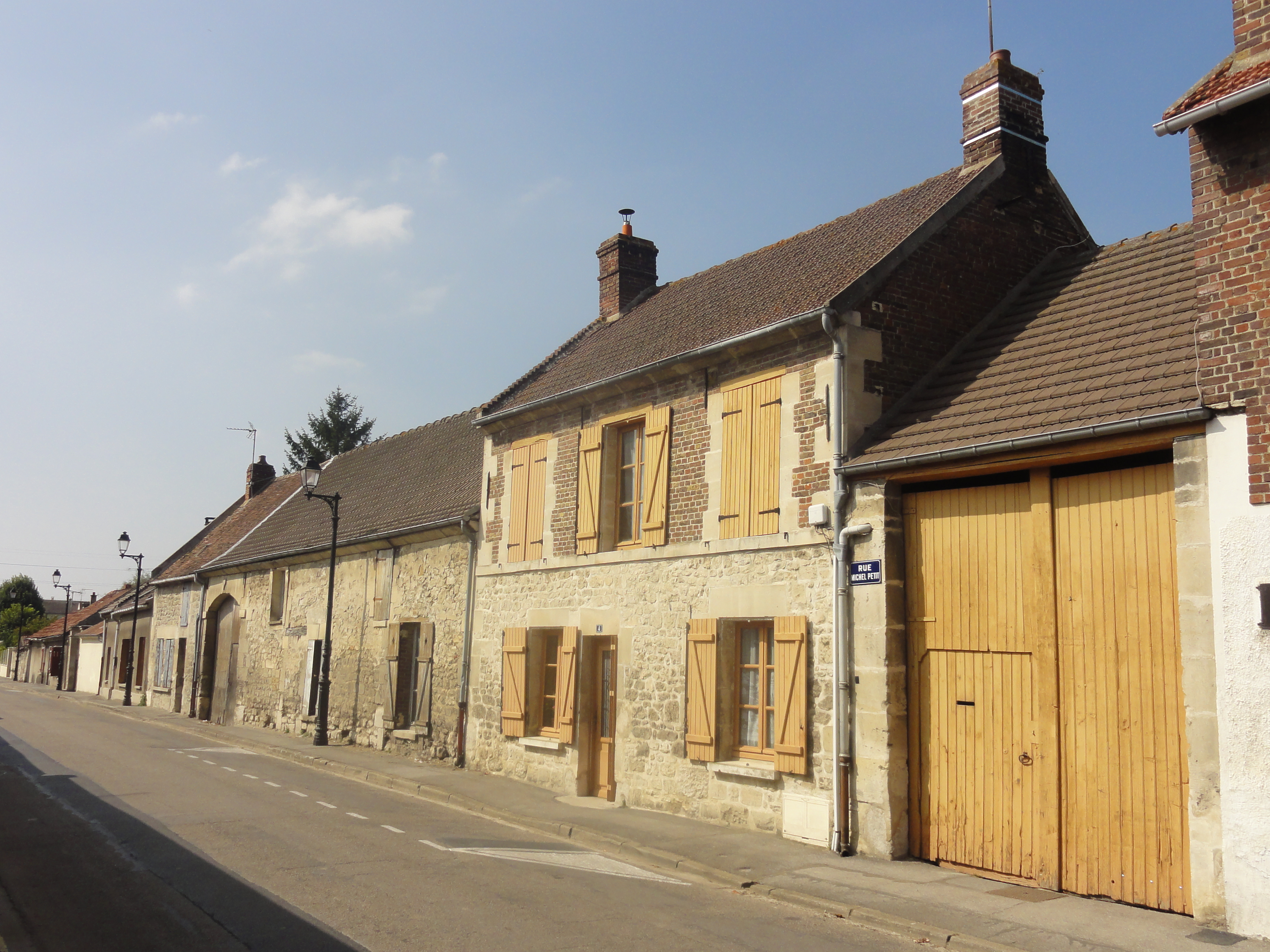 Rue Michel-Petit.